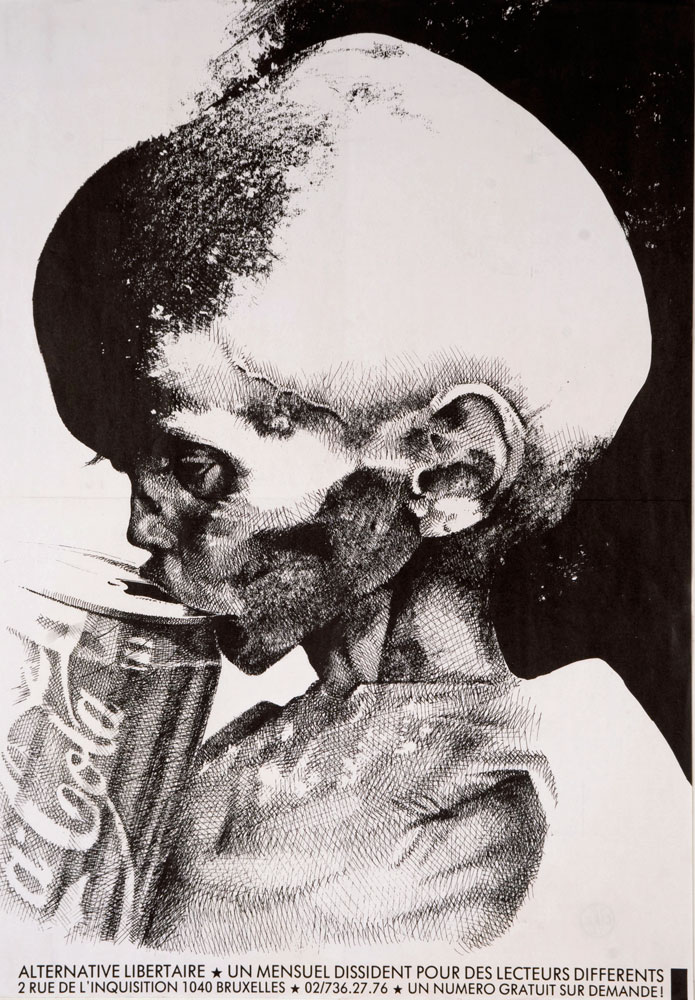 Une affiche réalisée pour le journal Alternative Libertaire en 1990 et rééditée en 1993.